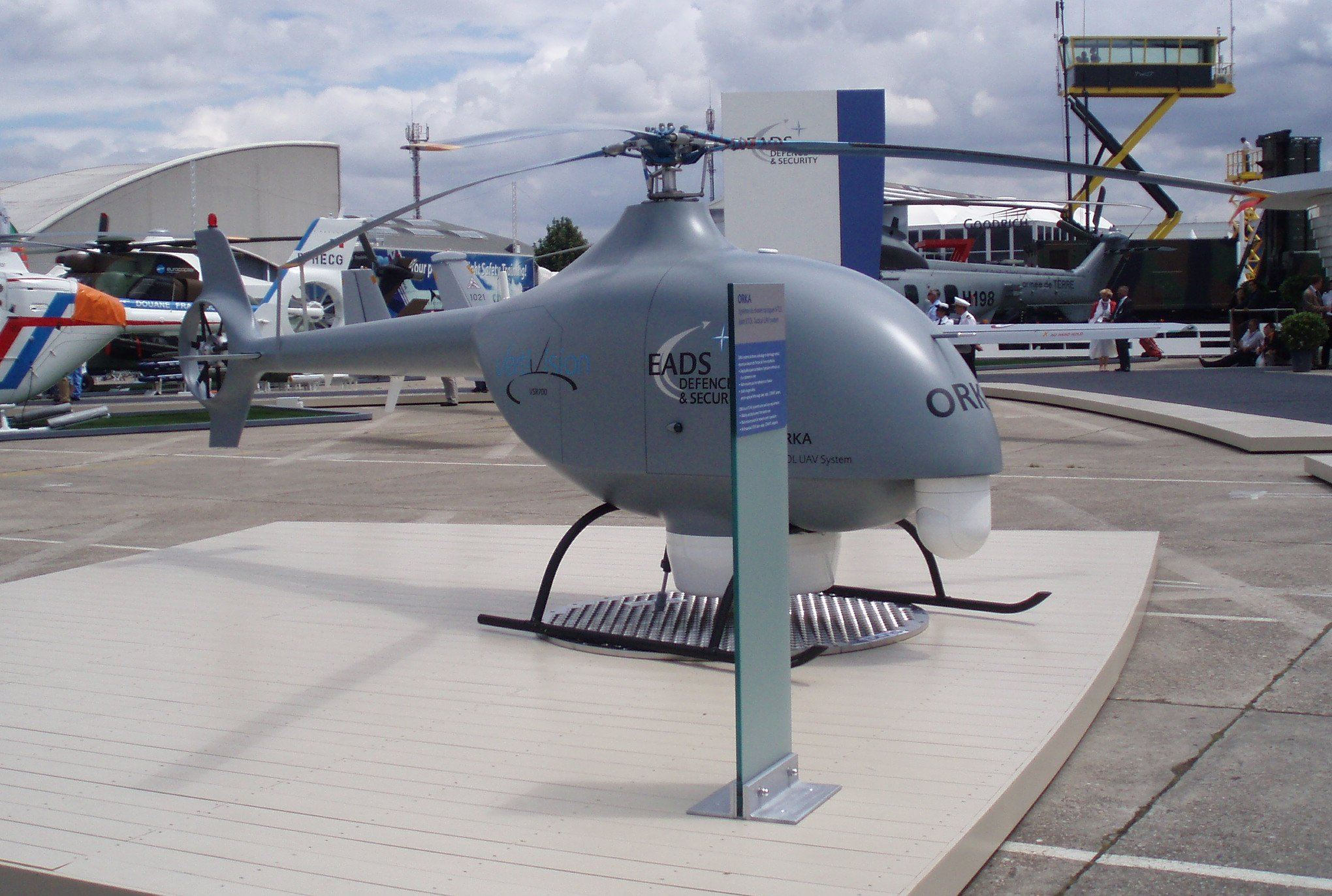 ORKA UAV